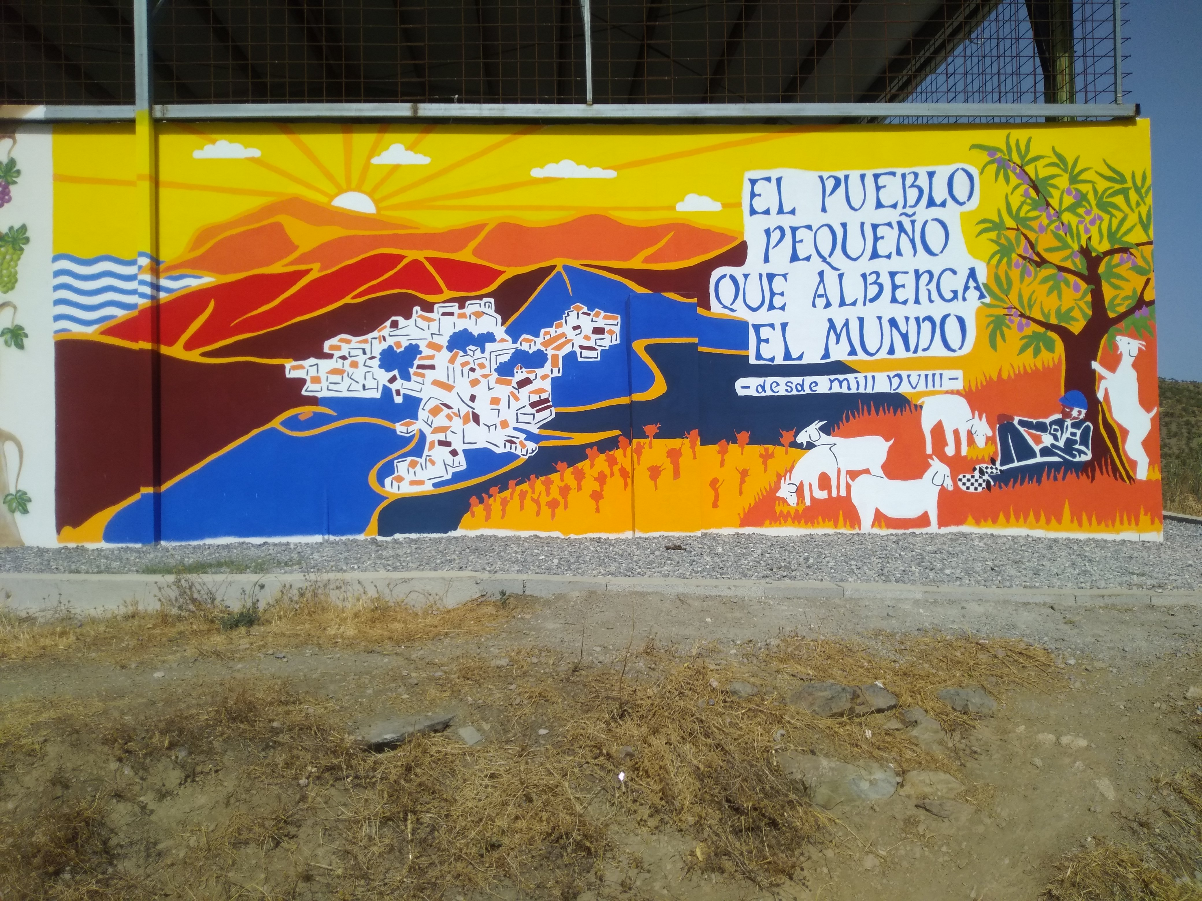 De muurschildering waarmee Thysa en Wijnand de eerste weekopdracht wonnen in RTL4 TV programma 'Het Spaanse Dorp: Polopos'.